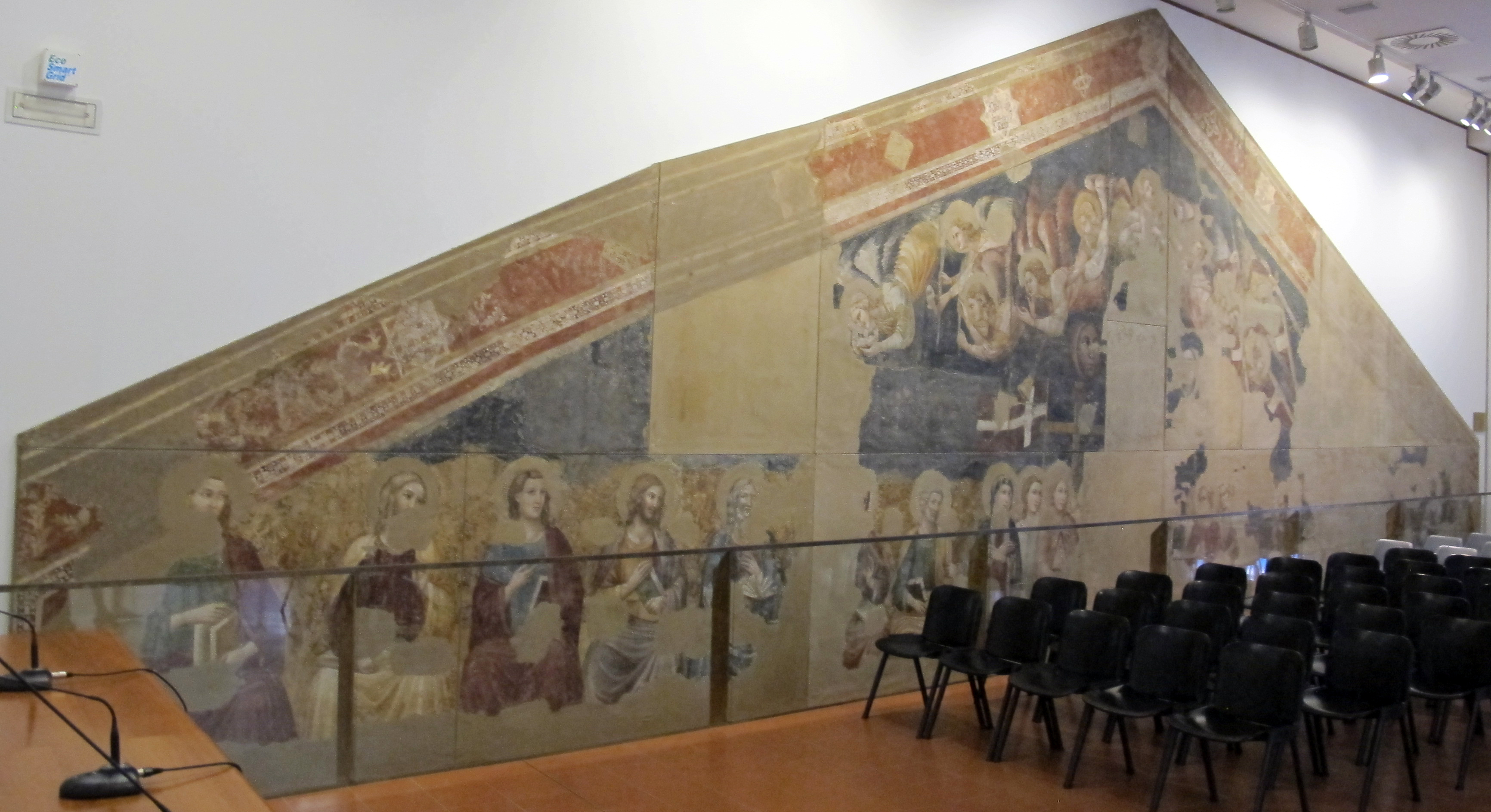 Scuola riminese, giudizio universale, da san giovanni evangelista (oggi sant'agostino) a rimini, 1310 ca.